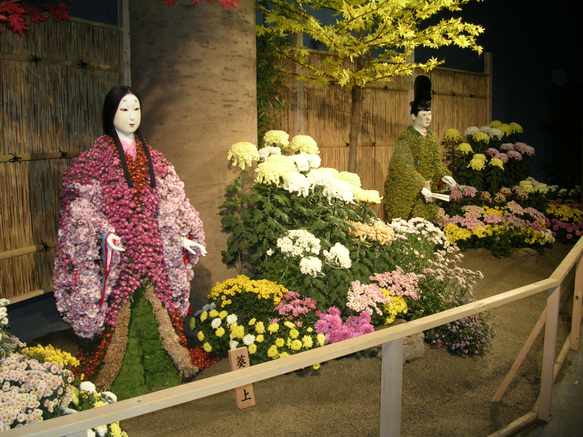 chrisanthemum dolls in Hirakata Park